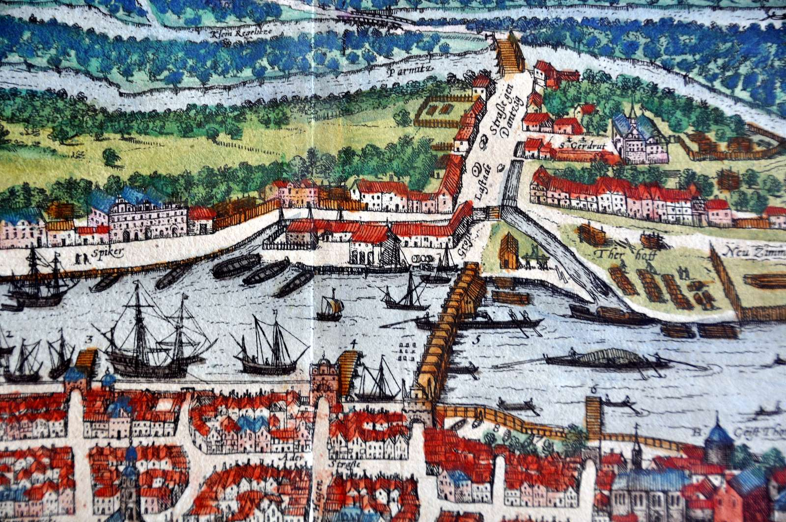 Fragment mapy. Najstarszy zachowany widok Szczecina "Alten Stettin", oryginalny ręcznie kolorowany miedzioryt z 1630 roku. Grafika z pracy Georga Brauna & Fransa Hogenberga „Civitates Orbis Terrarum” t. IV z 1581 roku; miedzioryt pochodzi z późniejszego wydania – Bleau, Amsterdam 1630 r.; wymiar arkusza: 540 mm x 400 mm, wymiar płyty: 475 mm X 330 mm. Dodatkowy opis: Na odwrocie widoku opis miasta w jęz. łacińskim. Rycina przedstawia Szczecin z lotu ptaka. Znajdują się na niej Zamek Książąt Pomorskich, ratusz miejski, Kościoły NMP, św. Jakuba, św. Jana oraz św. Mikołaja. Poza murami widoczne są przedmieścia Górny i Dolny Wik oraz podmiejskie ogrody. Przedstawiono nabrzeża portowe, a także mosty Długi i Kłodny. Autorzy szczegółowo opisali szczecińskie ulice, place oraz ważniejsze obiekty. Z lewej strony arkusza umieszczono legendę. W oddali schematycznie zaznaczono m. in. Stargard, Dąbie, Podjuchy oraz Gryfino.